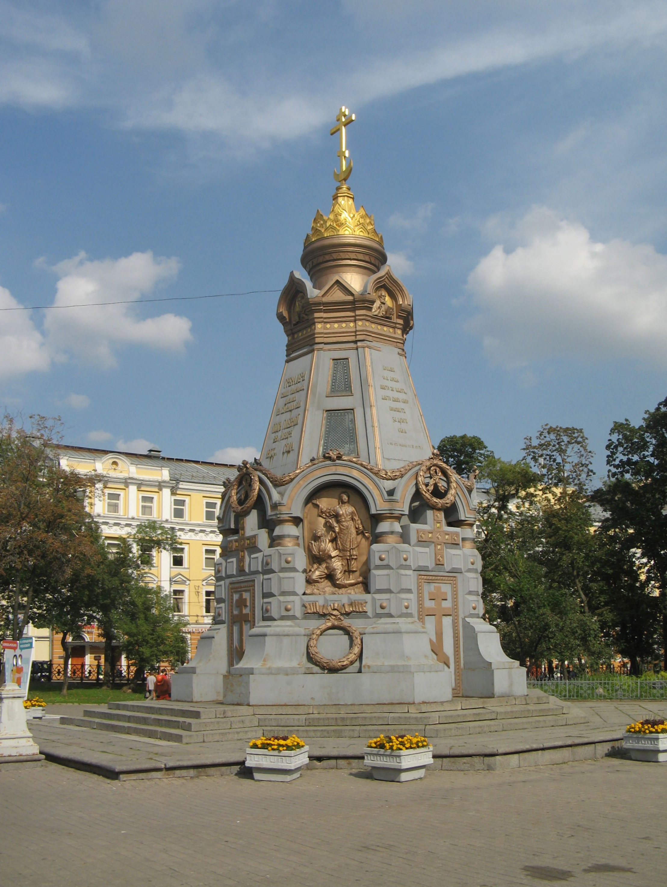 Памятник гренадерам, павшим под Плевной: Ильинские Ворота пл., д.2, Тверской, Центральный округ, Москва